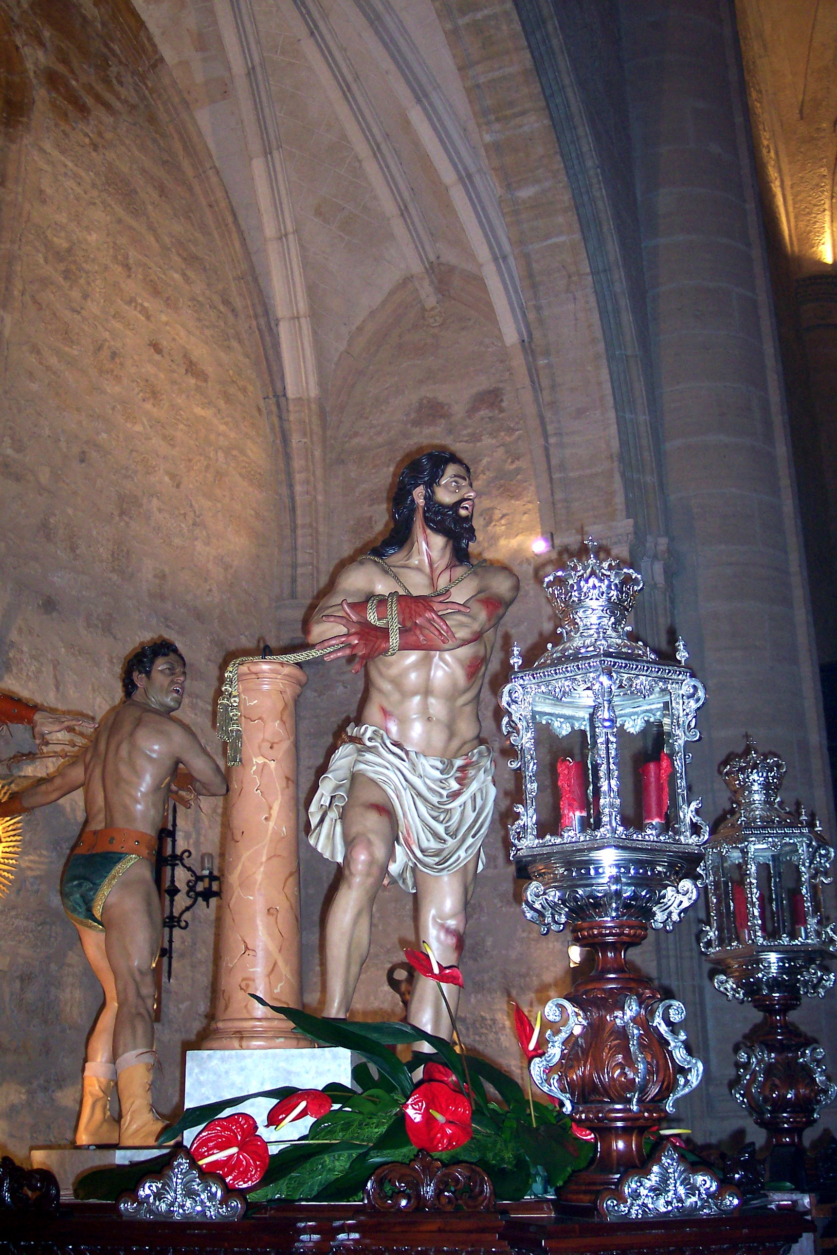 Imagen de la flagelación de Cristo. Cristo de la Pasión.